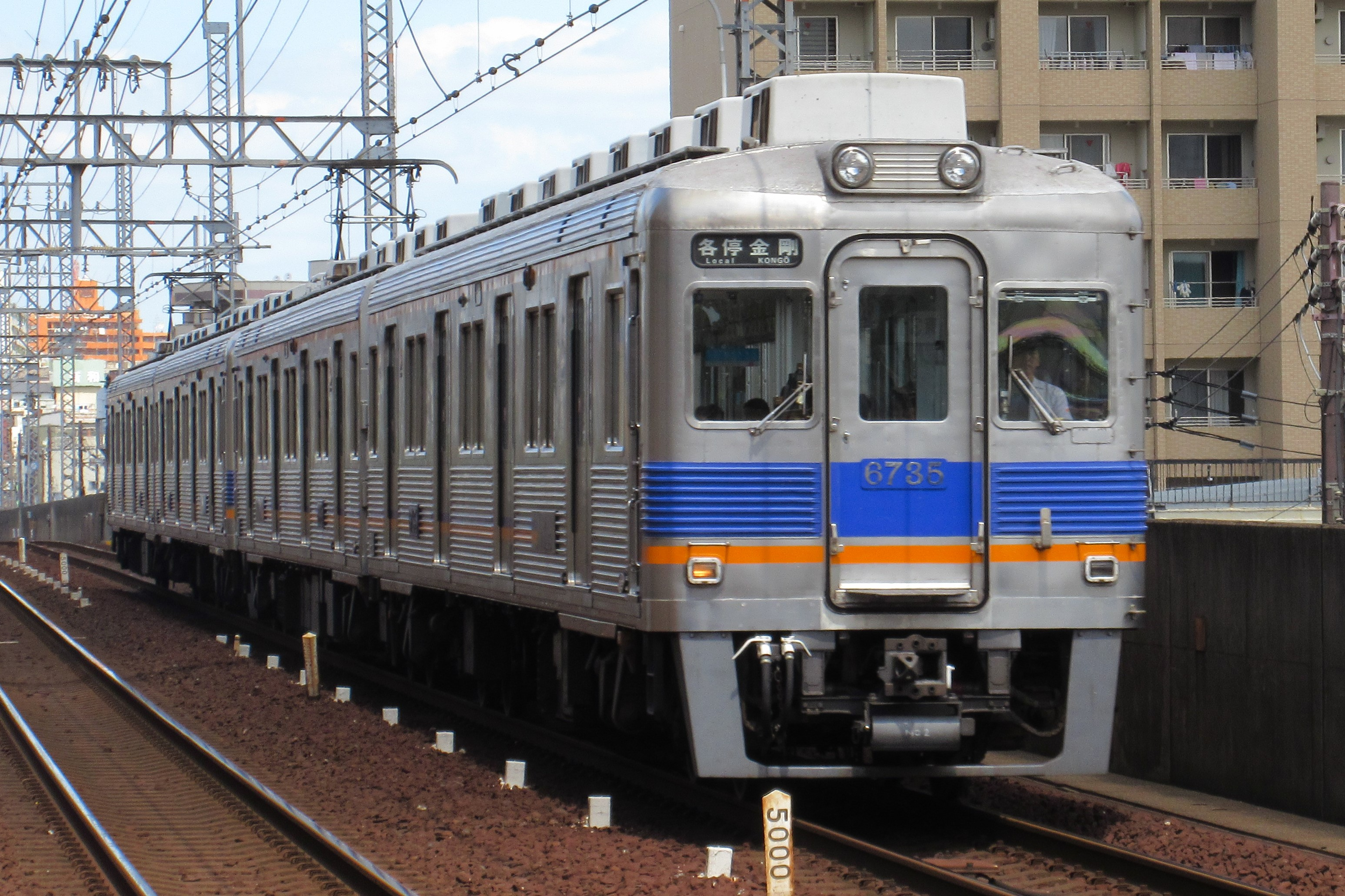 南海電鉄6735 (天下茶屋駅にて)